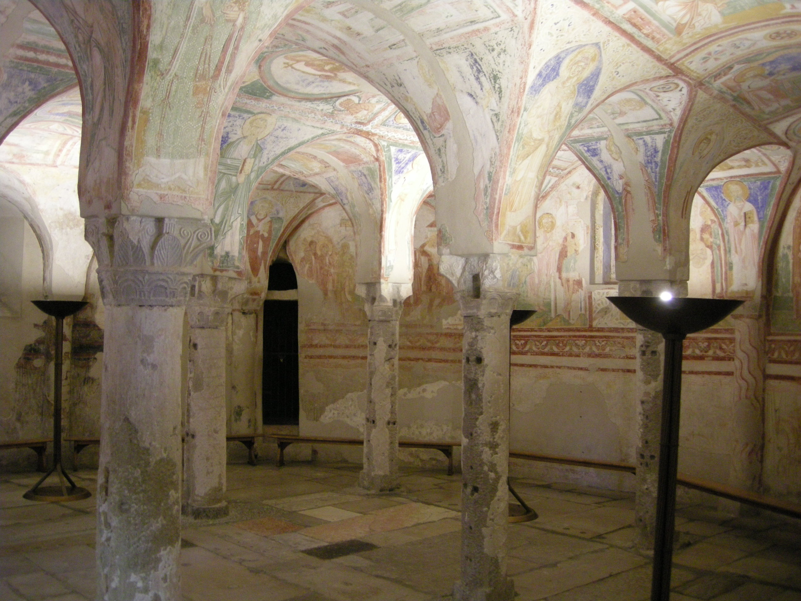 Basilica di aquilieia, cripta